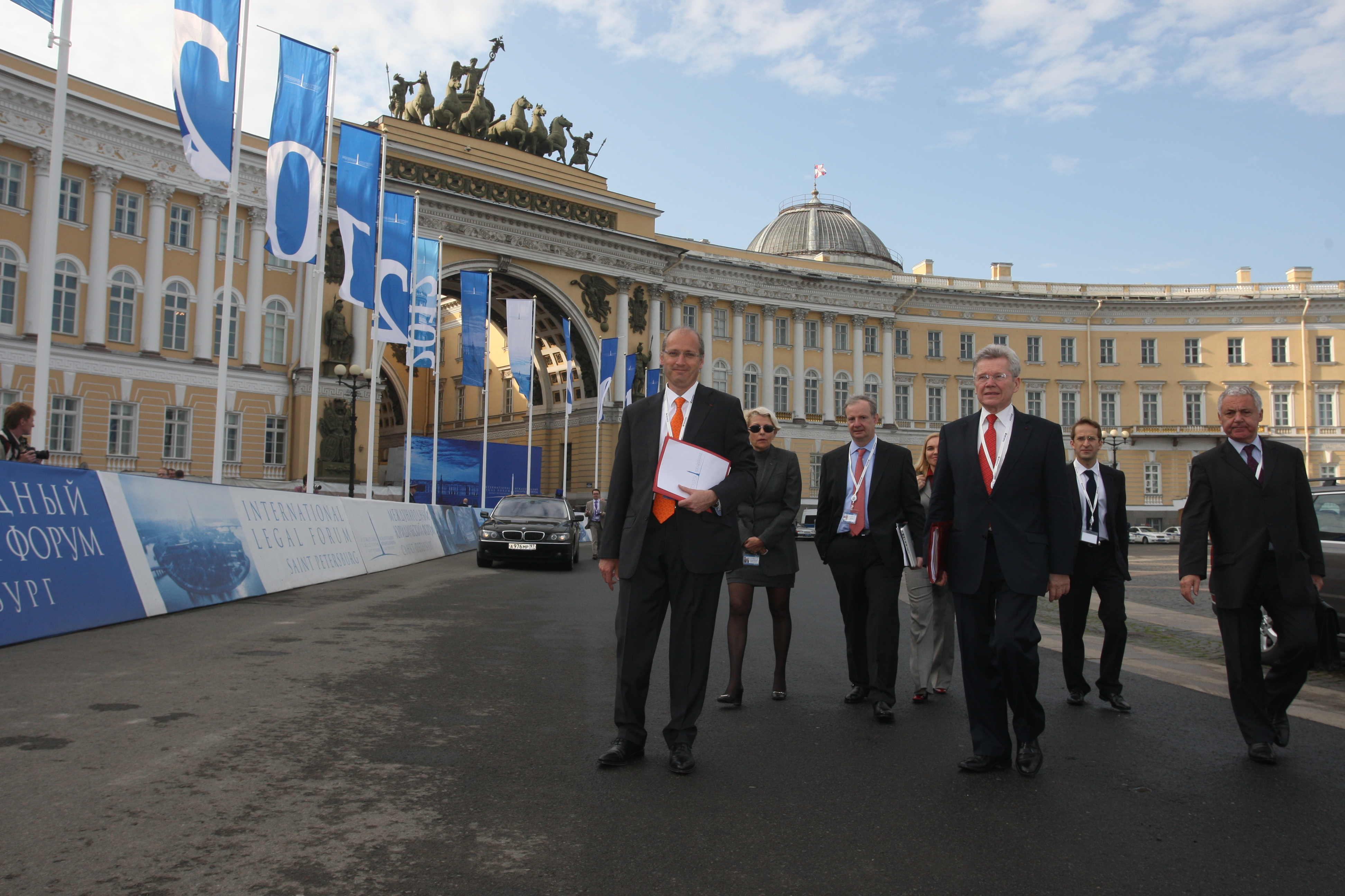 uchatniki dvortsovaya, spilf